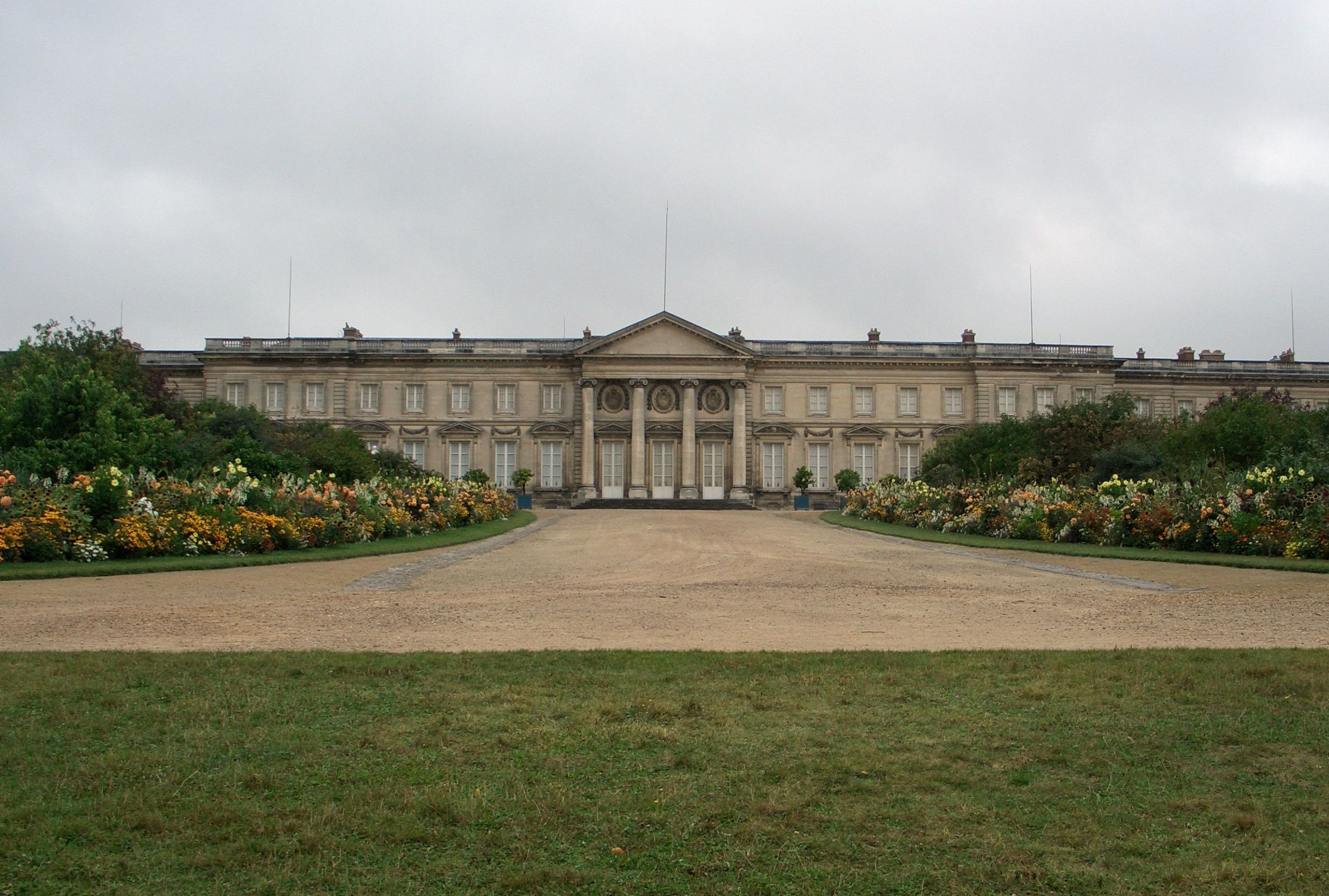 Castell de Compiègne - General